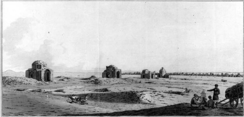 развалины Маджарских мавзолеев